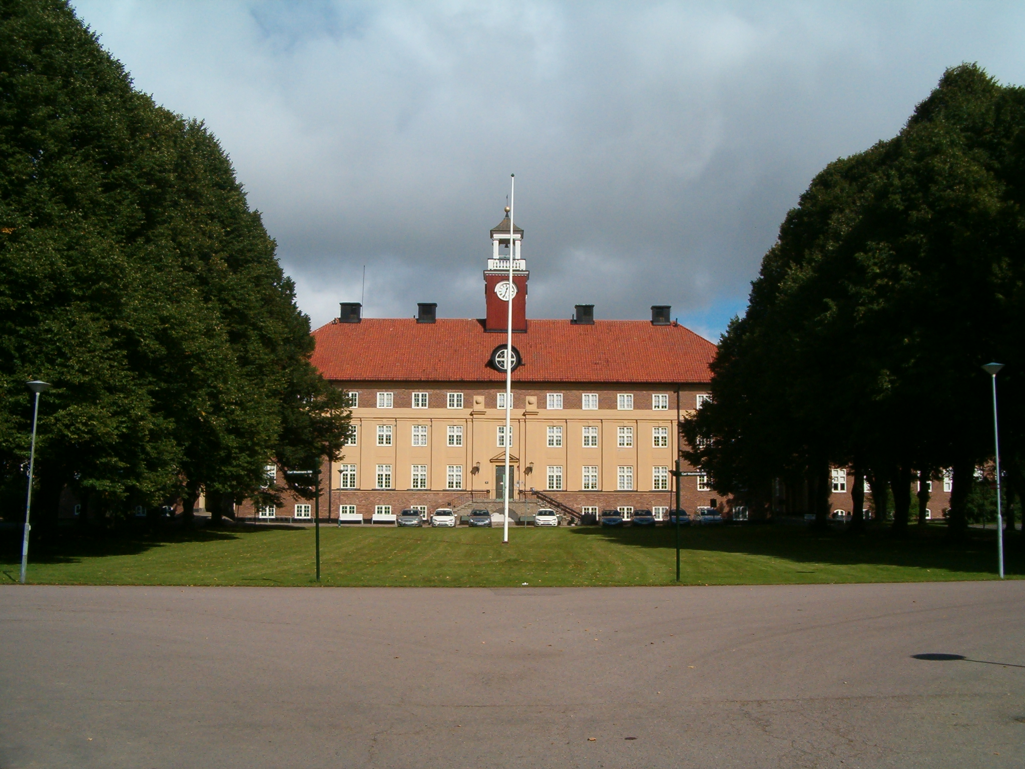 Sankta Maria, former mental hospital in Helsingborg, Sweden.